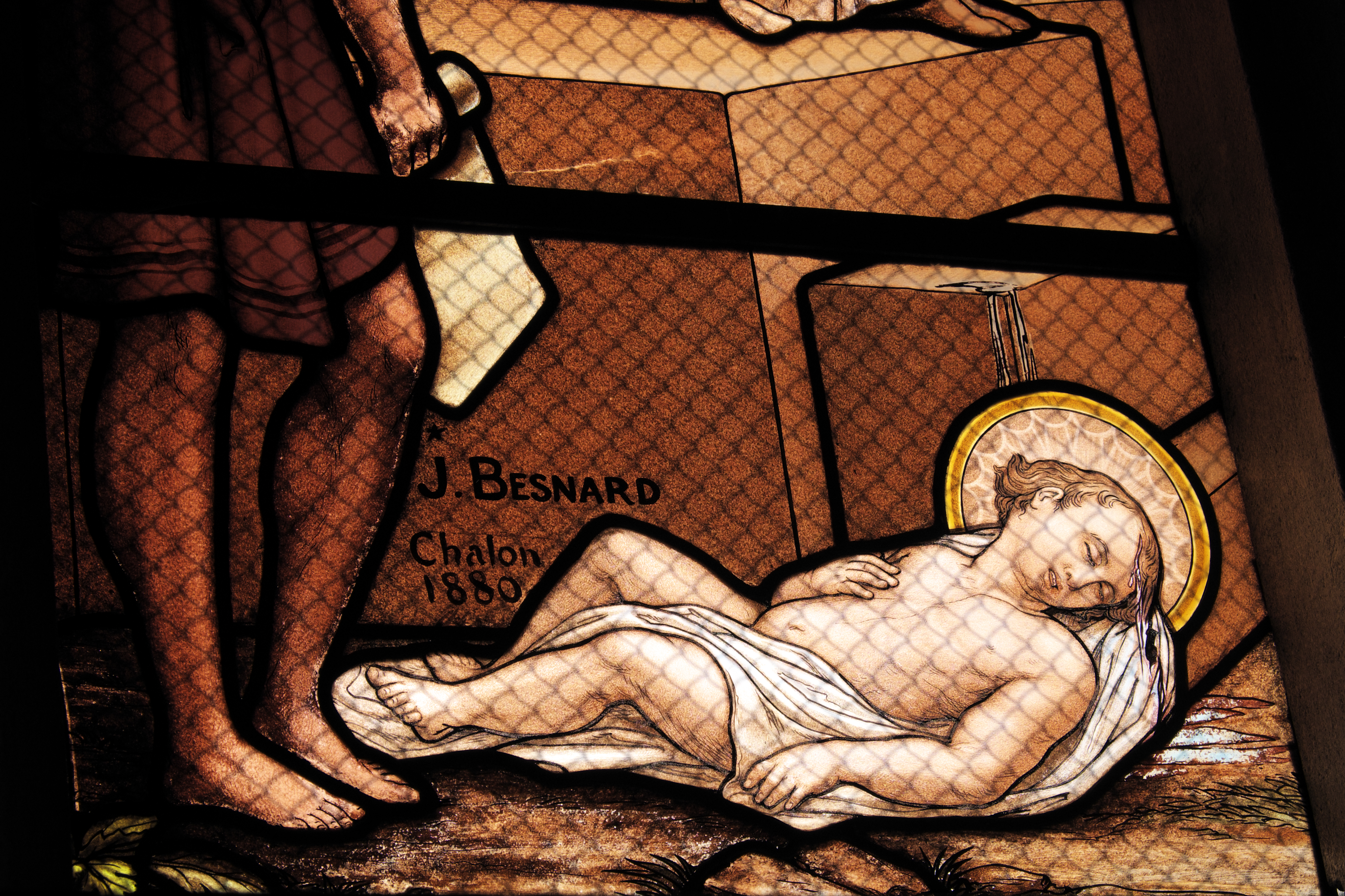 Katholische Kirche Saint-Cyr-et-Sainte-Julitte in Volnay im Département Côte-d’Or (Bourgogne-Franche-Comté/Frankreich), Bleiglasfenster mit der Signatur: J. Besnard à Chalon 1880; Darstellung: Quiricus und Julitta (Ausschnitt: Quiricus)